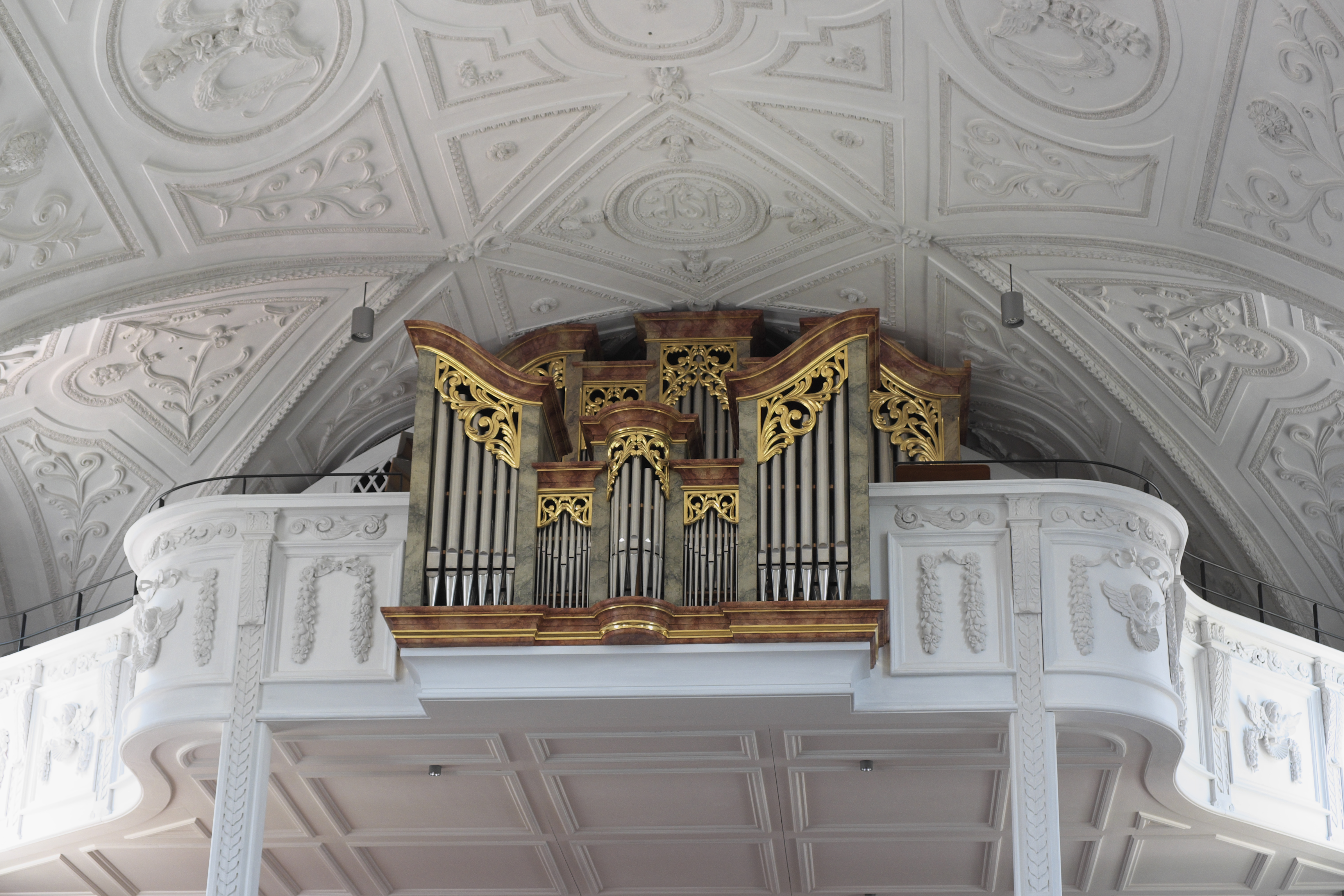 Katholische Pfarrkirche St. Lorenz in Oberföhring im Stadtbezirk Bogenhausen in München (Bayern/Deutschland), obere Empore und Orgel